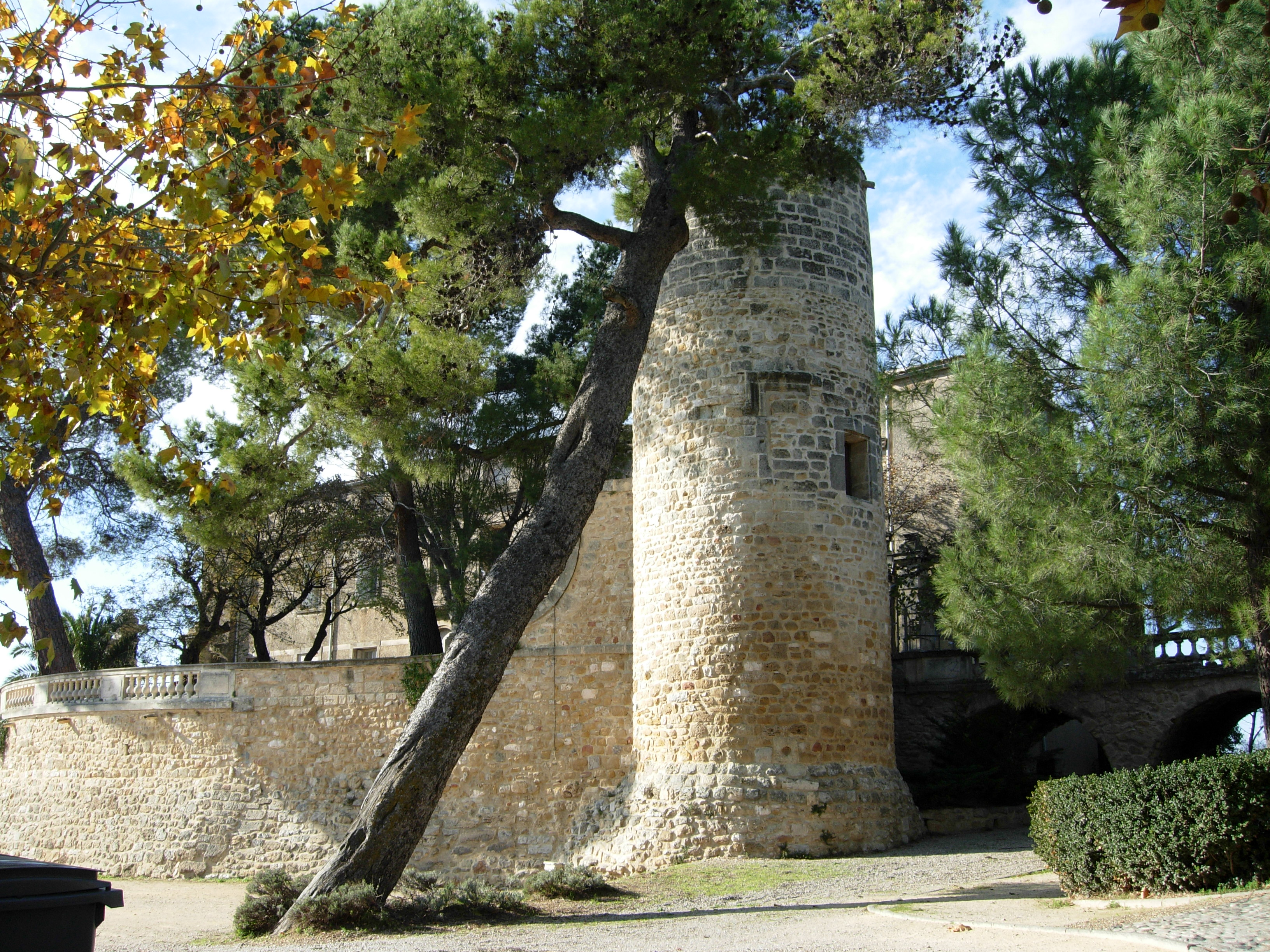 Popian (Hérault) - château et mairie.